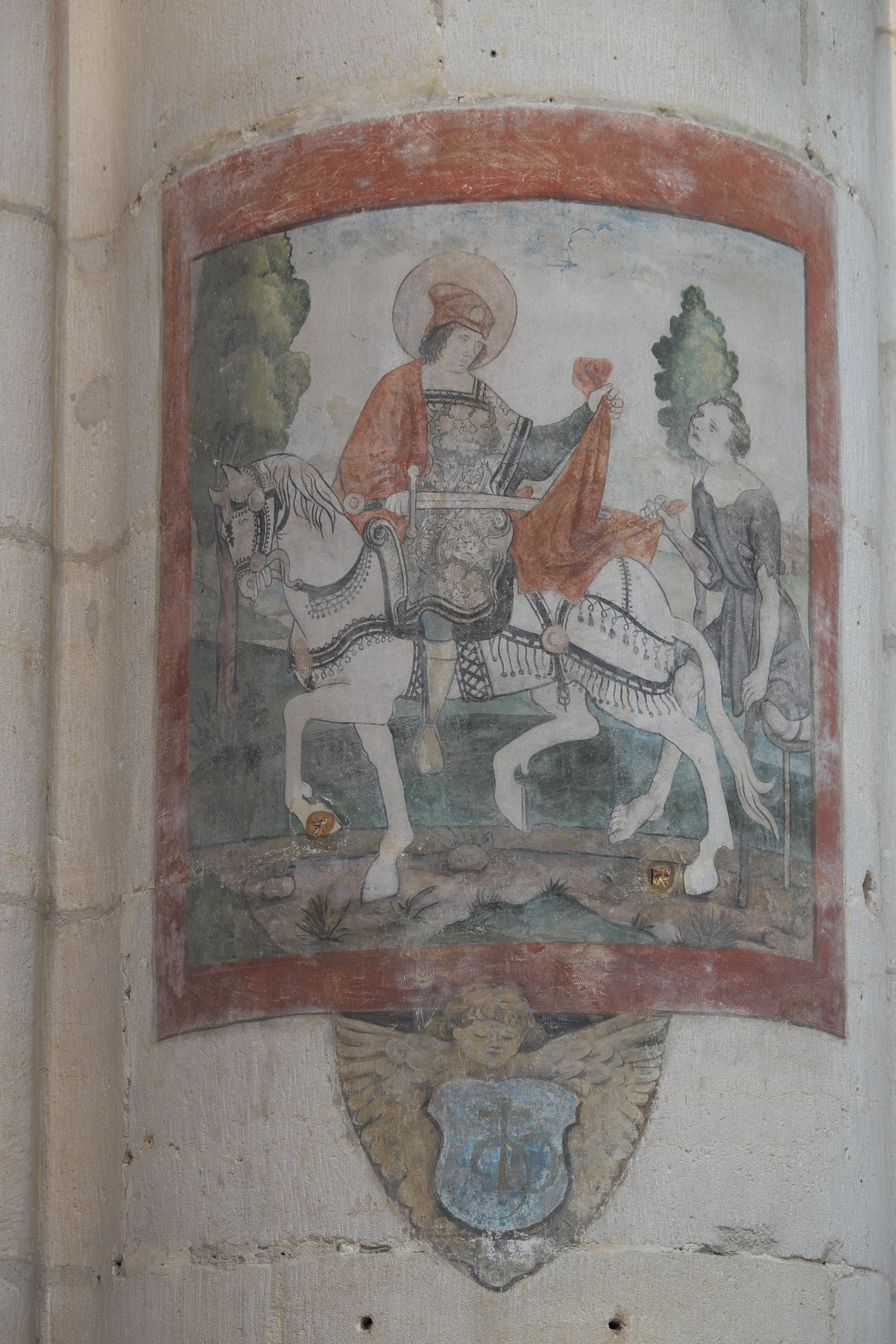 Basilika Saint-Nicolas in Saint-Nicolas-de-Port im Département Meurthe-et-Moselle (Lothringen/Frankreich), Wandmalerei aus dem frühen 16. Jahrhundert; Darstellung: Hl. Martin teilt seinen Mantel mit einem Bettler